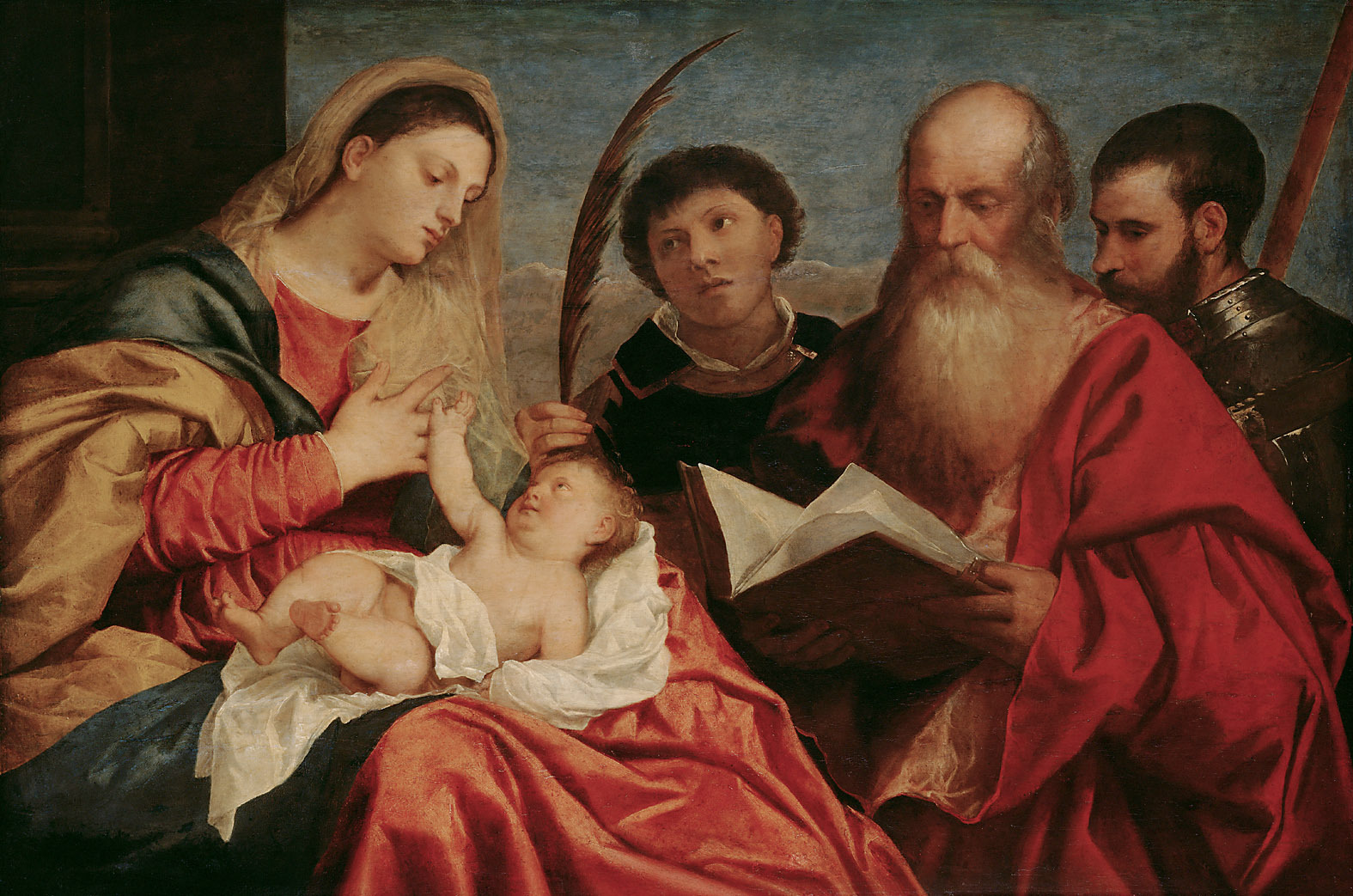 Madonna with Child and Saints by Titian (1520); Kunsthistorisches Museum, Vienna Maria mit Kind und den Hll. Stephanus, Hieronymus und Mauritius um 1520 Pappelholz 92.5 x 138 cm